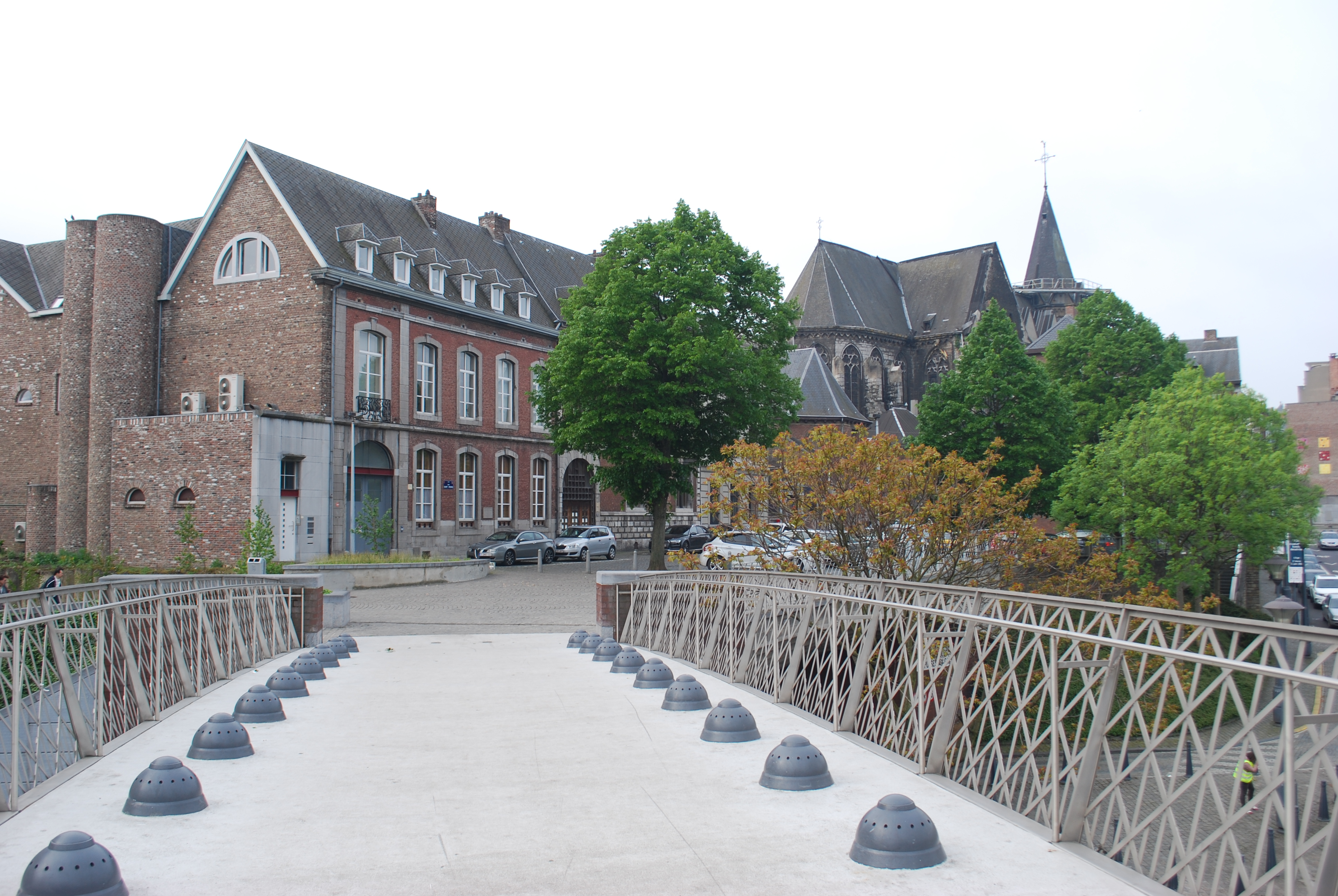 Vue des côteaux de la Citadelle, à Liège.